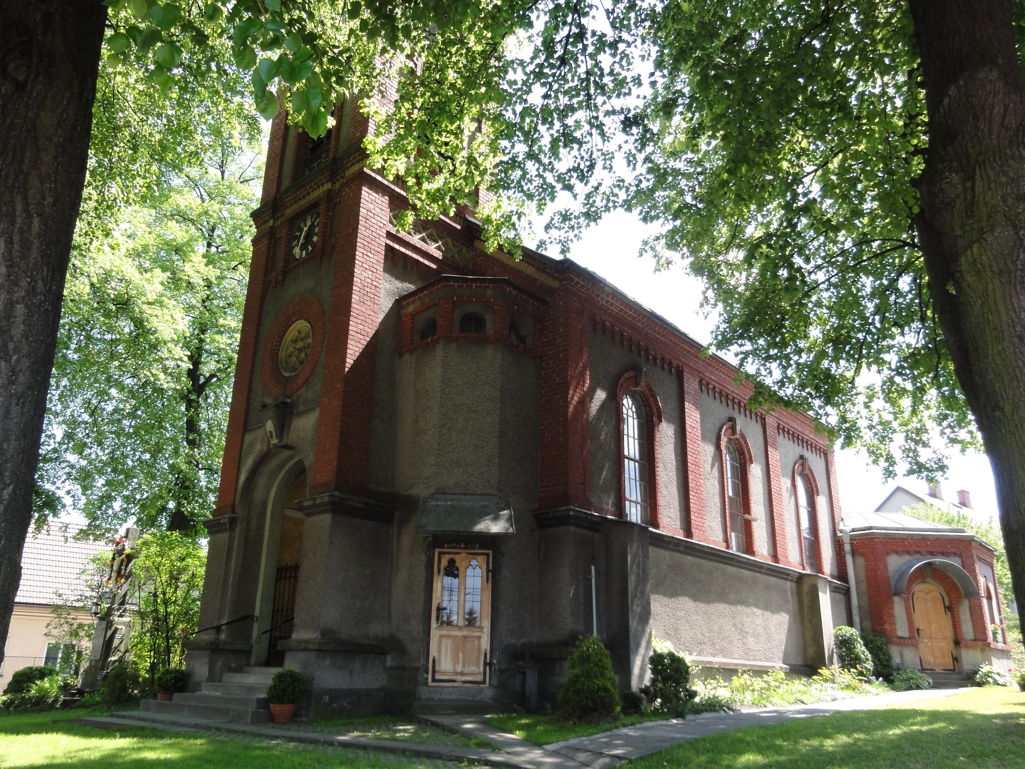 Czeski Cieszyn, Sibica, kościół św. Jadwigi